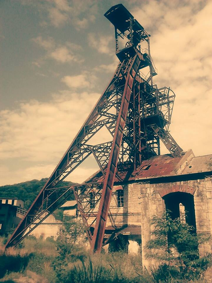 Turnul face parte din ansamblul Puțului I din Anina; este un ansamblu de monumente istorice aflat pe teritoriul orașului Anina